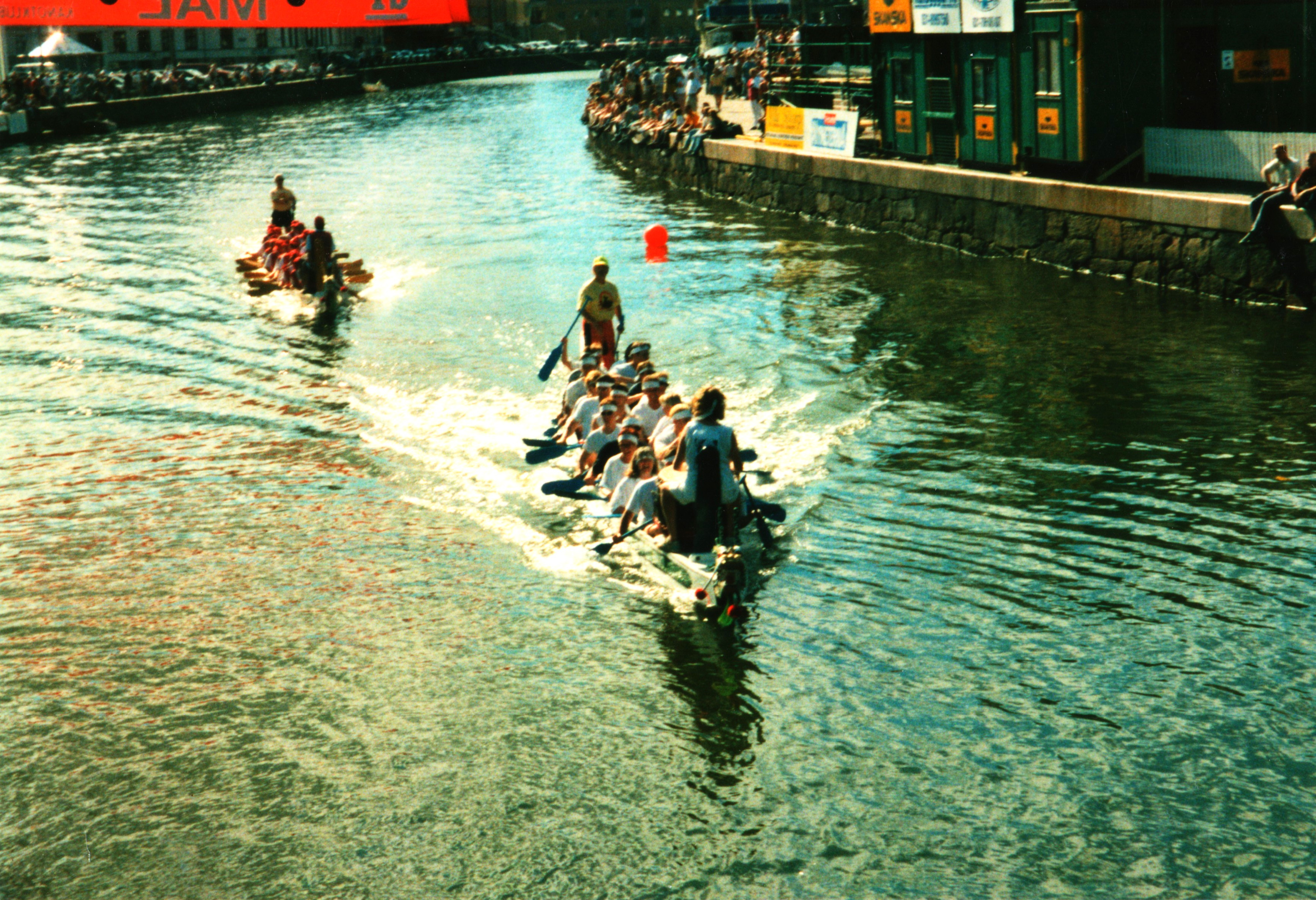 Drakbåtsrodd, Vallgraven (1980-talet?). Ev. från drakbåtsfestival (1992?).